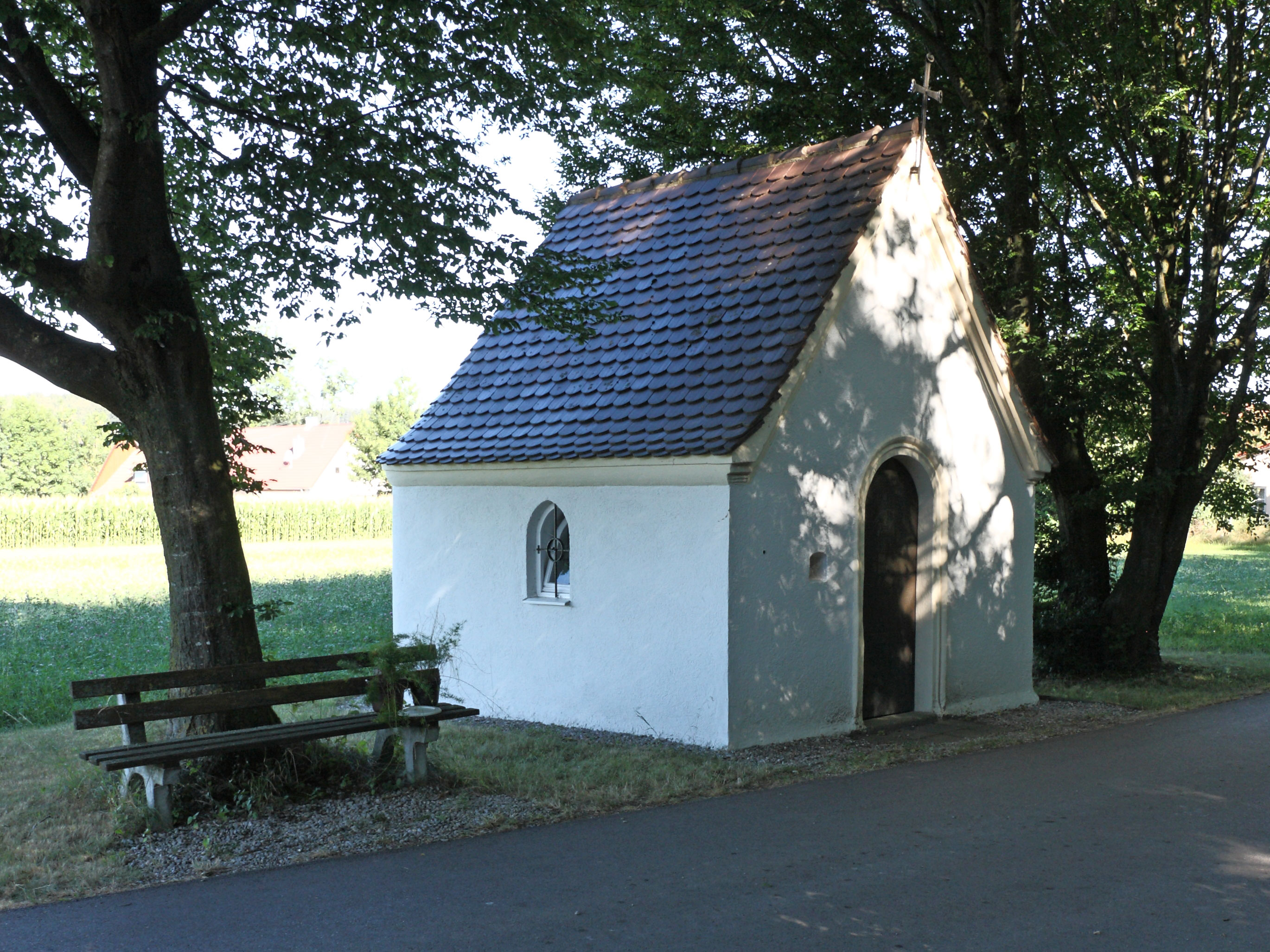 Ansicht von Südosten